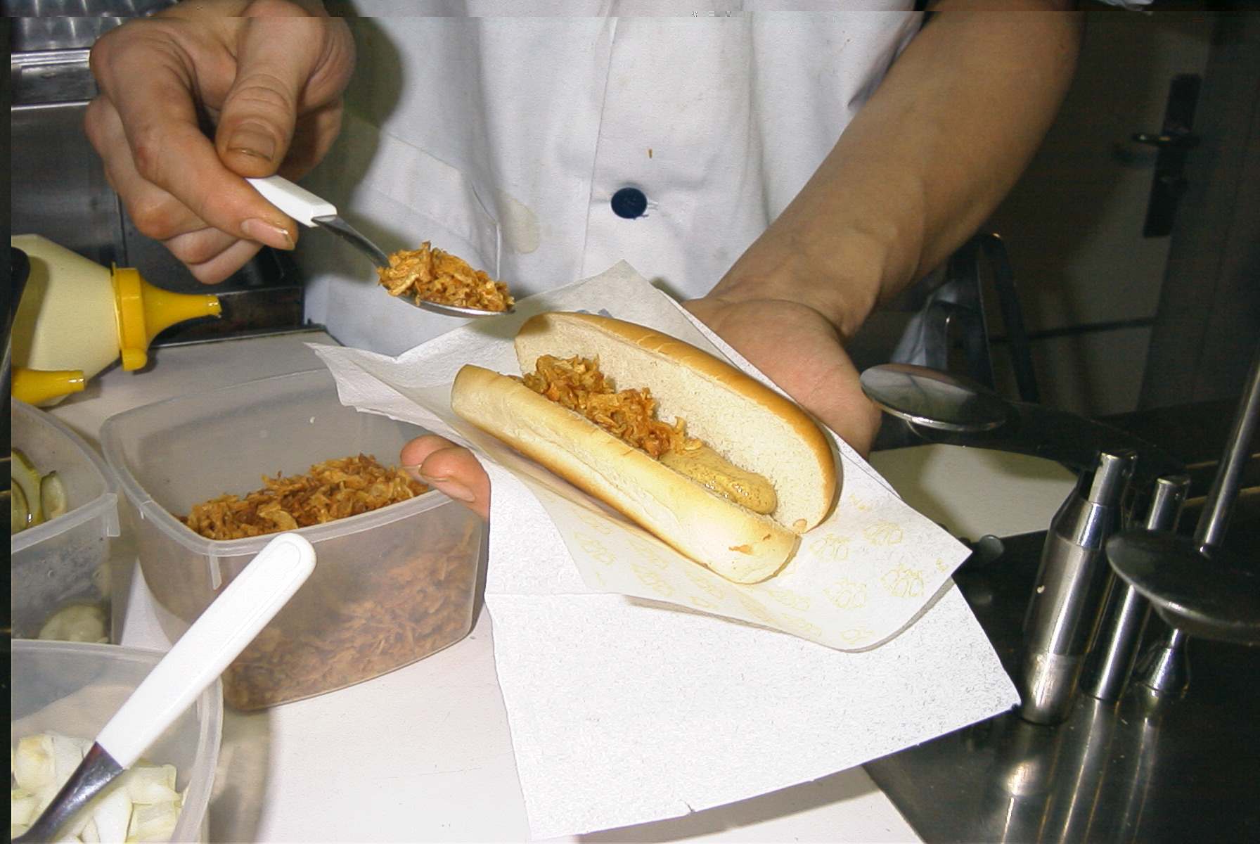 Tilberedning af kradser hvor ingredienserne lægges ind i pølsebrødet.